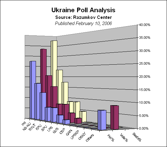 Analisis de las elecciones ucranianas del 2006